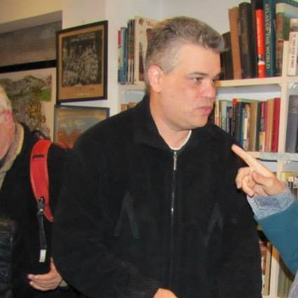 רונן סוניס